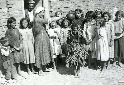 Обряд Пеперуда, исполняемый в Добруджи. Болгария, 1950-е годы. Фото из цыганского архива «Студия романи»